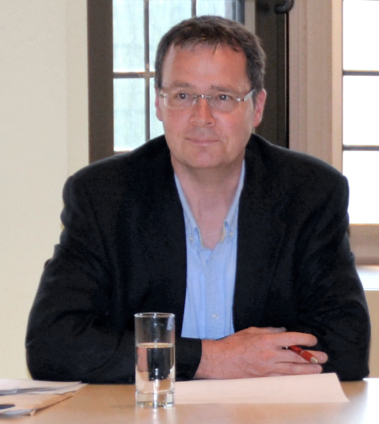 Schatzmeister Axel Friedrichs bei der Jahresversammlung 2014 in Hannover der Archäologischen Kommission für Niedersachsen